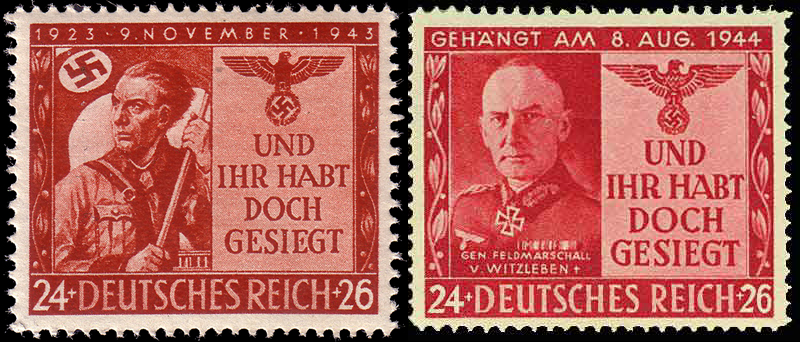 Почтовая марка Германии, посвящённая годовщине "пивного путча" 1923 года, 24+26 пфеннигов, 1943 год. Английская пропагандистская марка, посвящённая казнённому Эрвину фон Вицлебену, 1944 год.